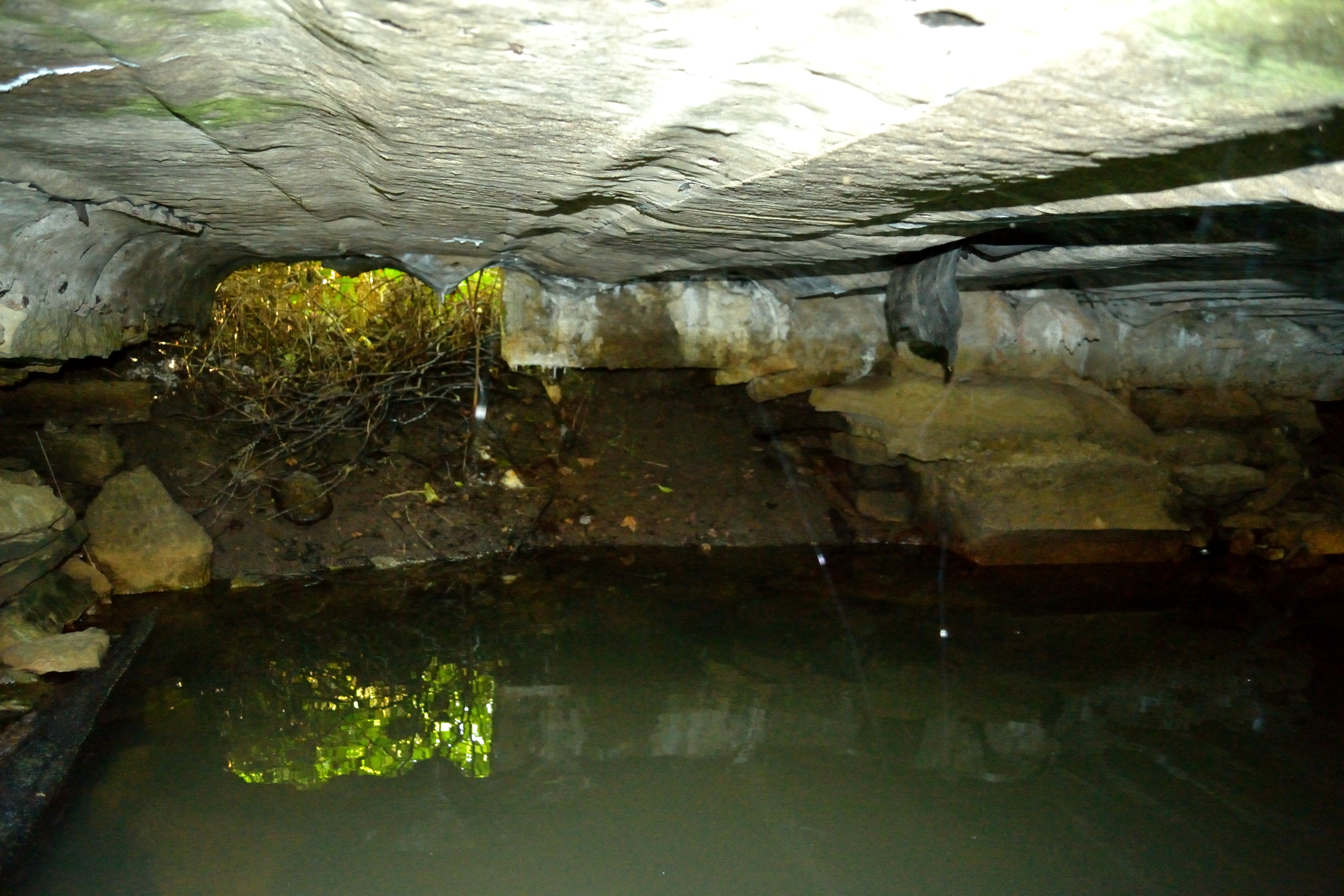 Peeter Suure Merekindluse Vääna-Posti positsiooni läänepoolsed kaevikud koos jaovarjenditega